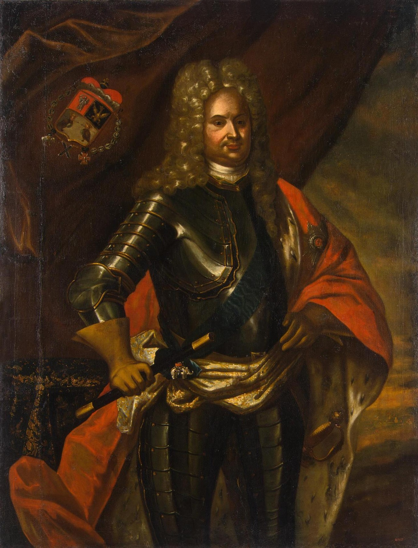 Portrait of Anikita Repnin (1668-1726)